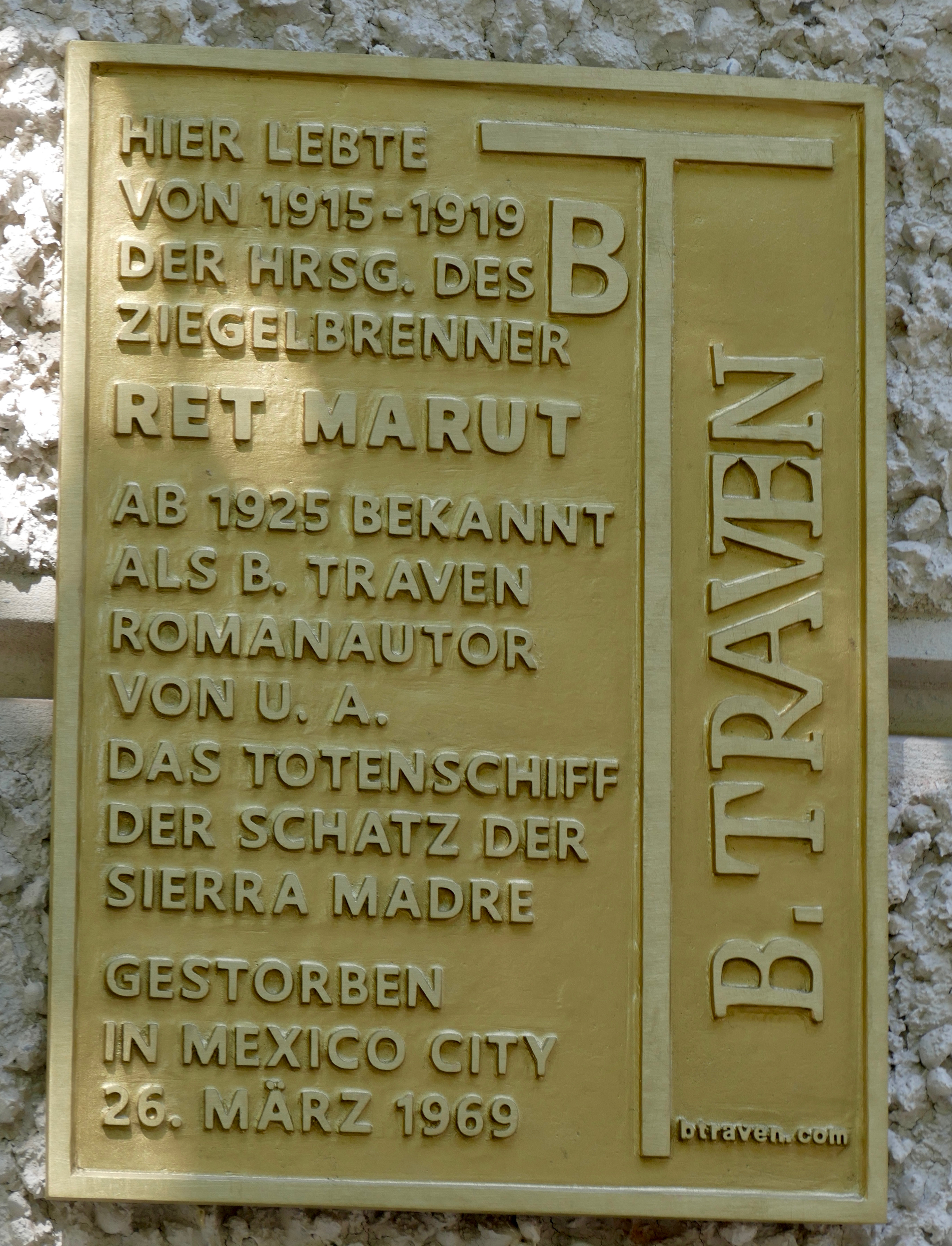 Enthüllung einer Gedenktafel für B.Traven (Ret Marut) am Wohnhaus Clemensstraße 84 in München, wo der Schriftsteller von 1915-1919 lebte. Exakt 100 Jahre nachdem Ret Marut aus München fliehen konnte, um seiner Hinrichtung zu entgehen.